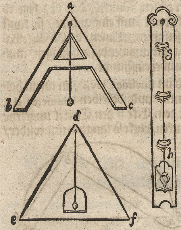 Original image description from the Deutsche Fotothek Geometrie & Vermessung & Instrument